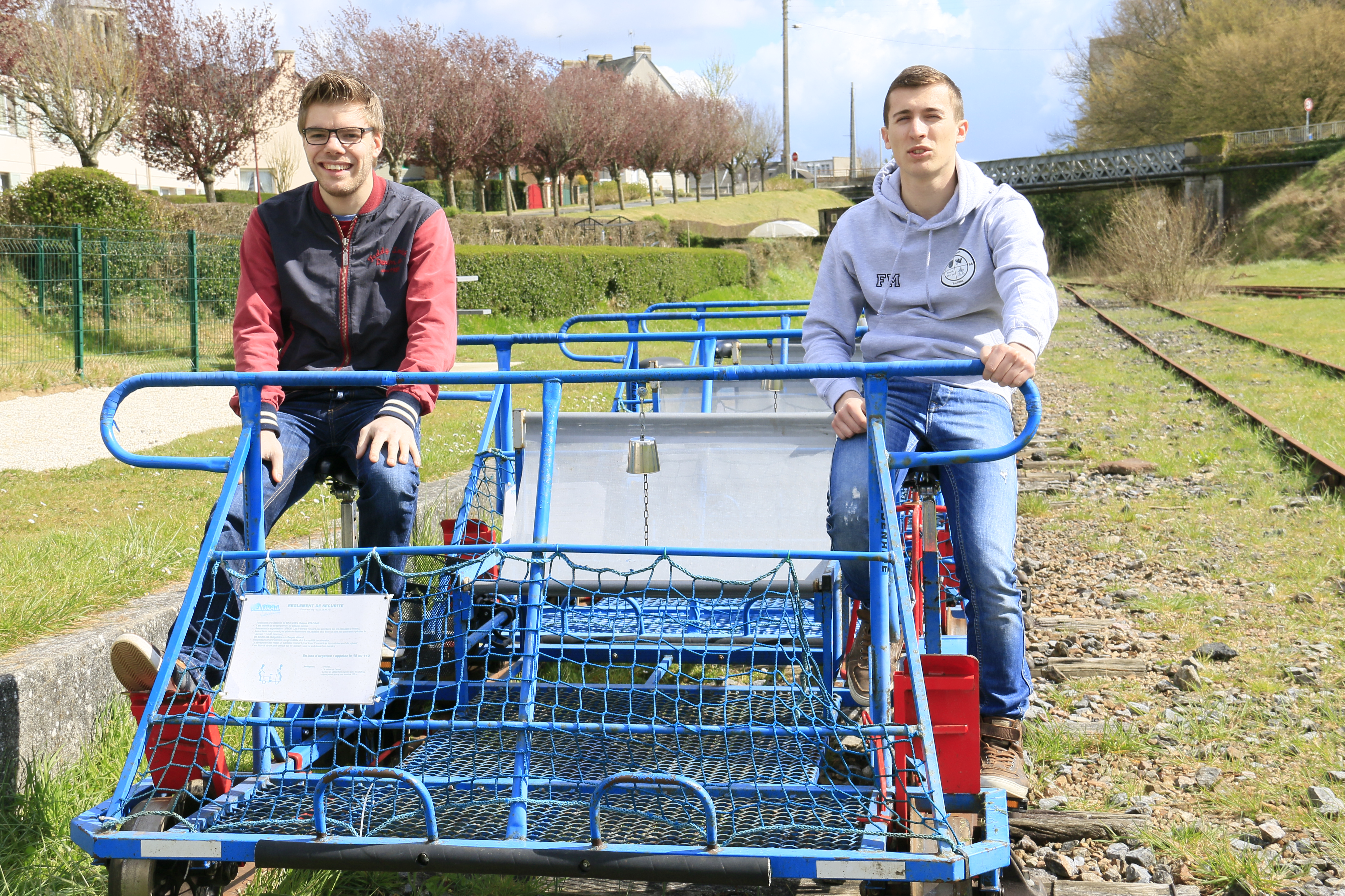 un cyclo-draisine prêt à partir